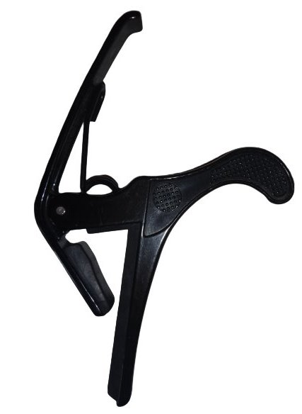 Каподастр